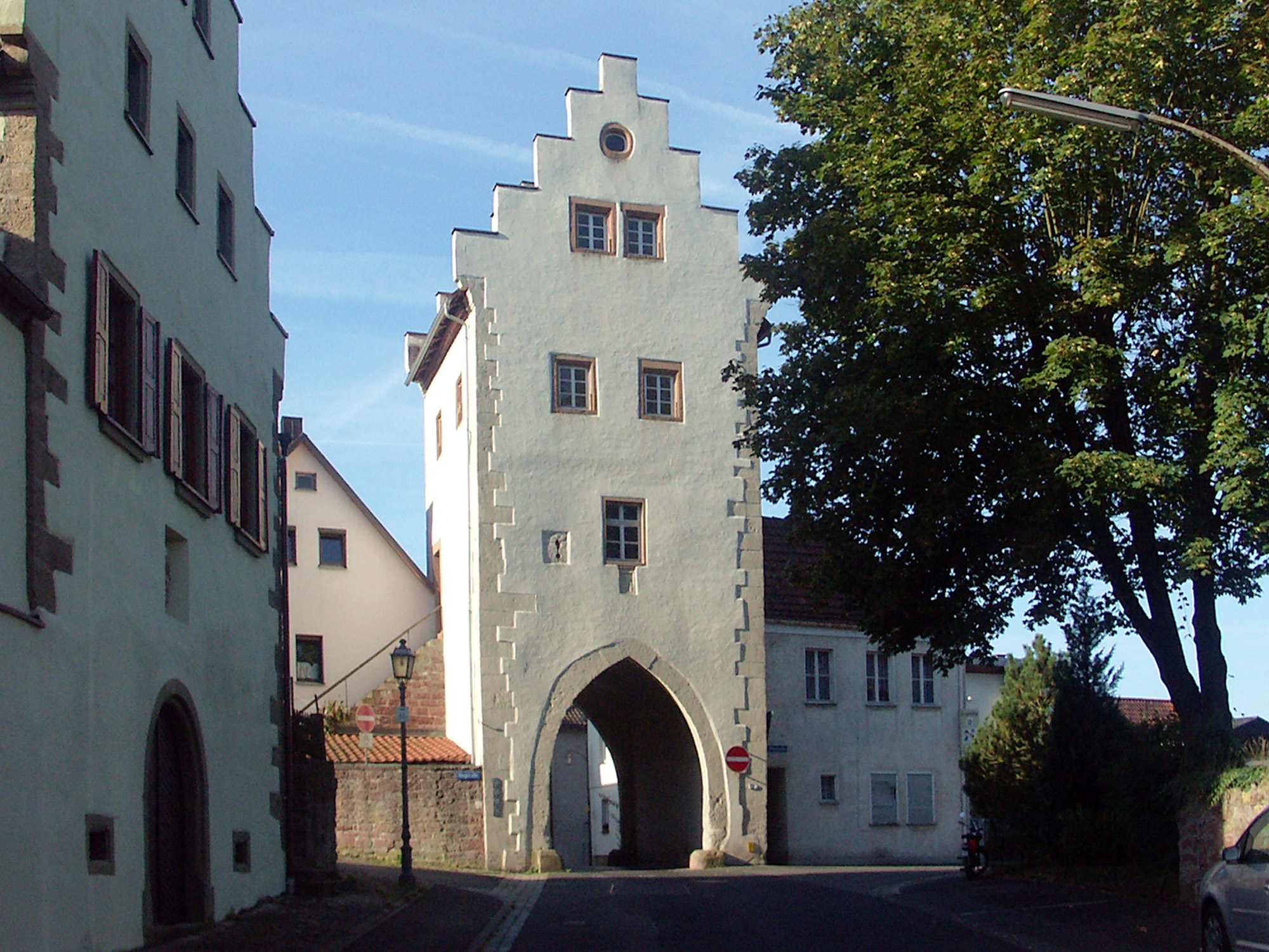 Das als Torhaus bezeichnete Stadttor in Euerdorf, links das ehemalige Zehnthaus